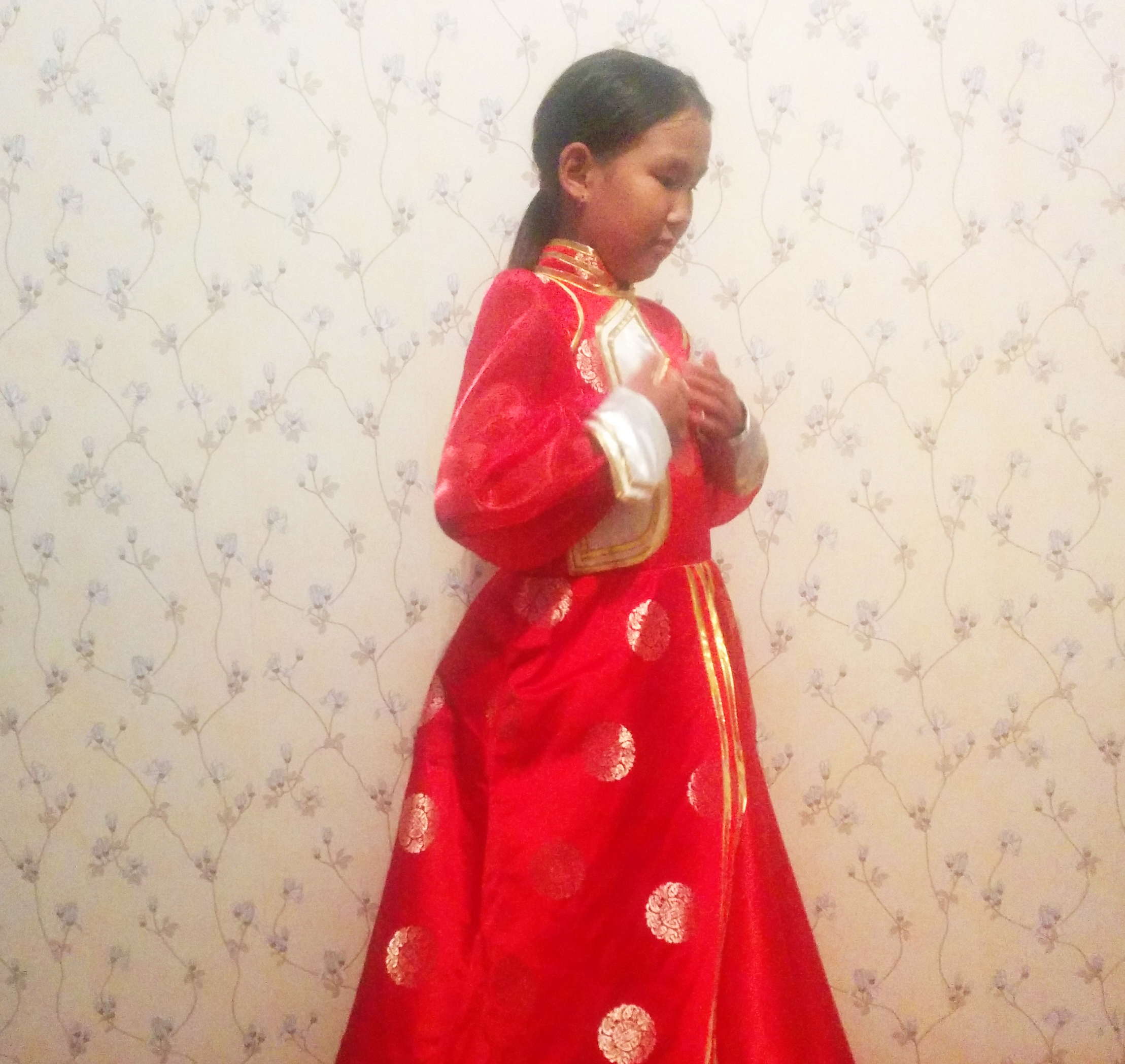 Тыва дыл: Чаш уругнуң тыва национал плайказы